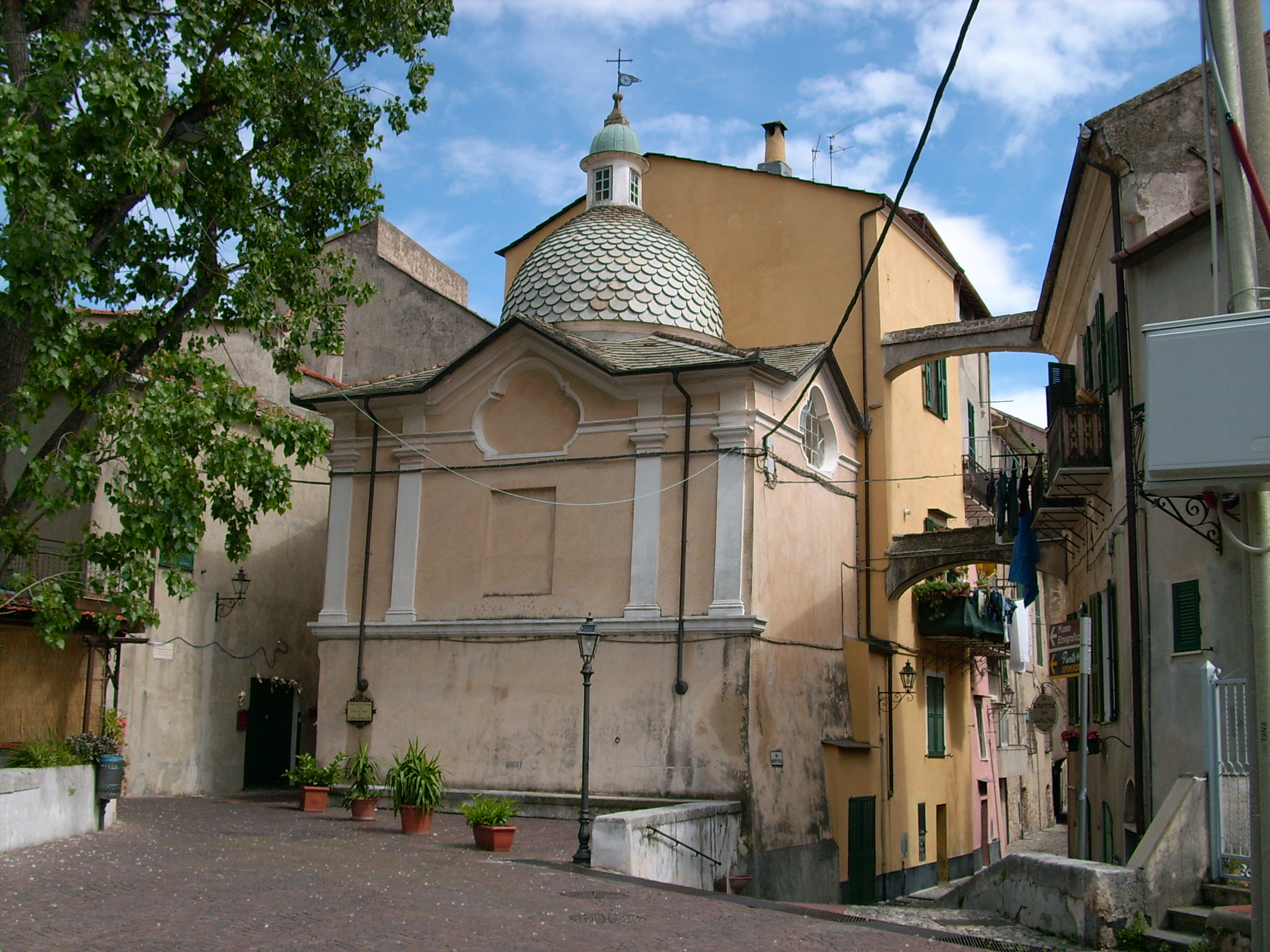 Toirano, Liguria, Italia